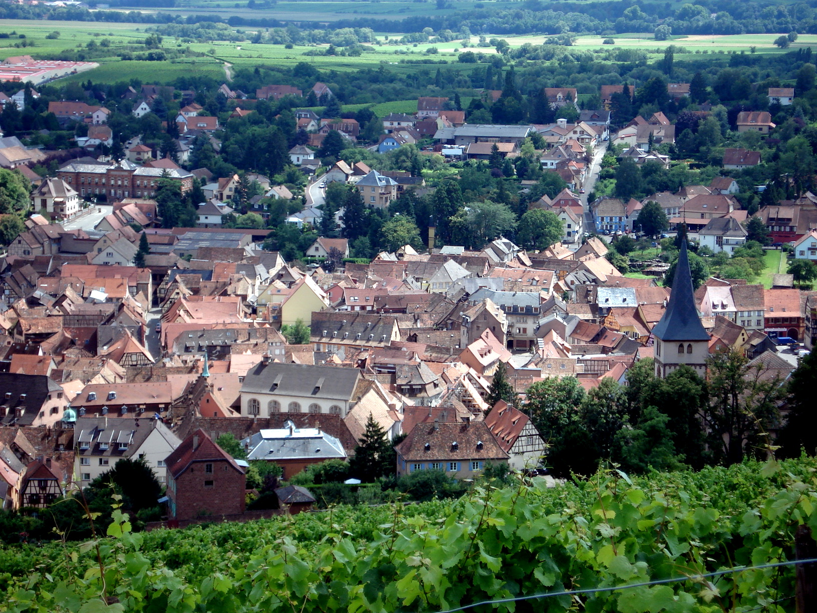 Barr, Alsace, France, vue générale